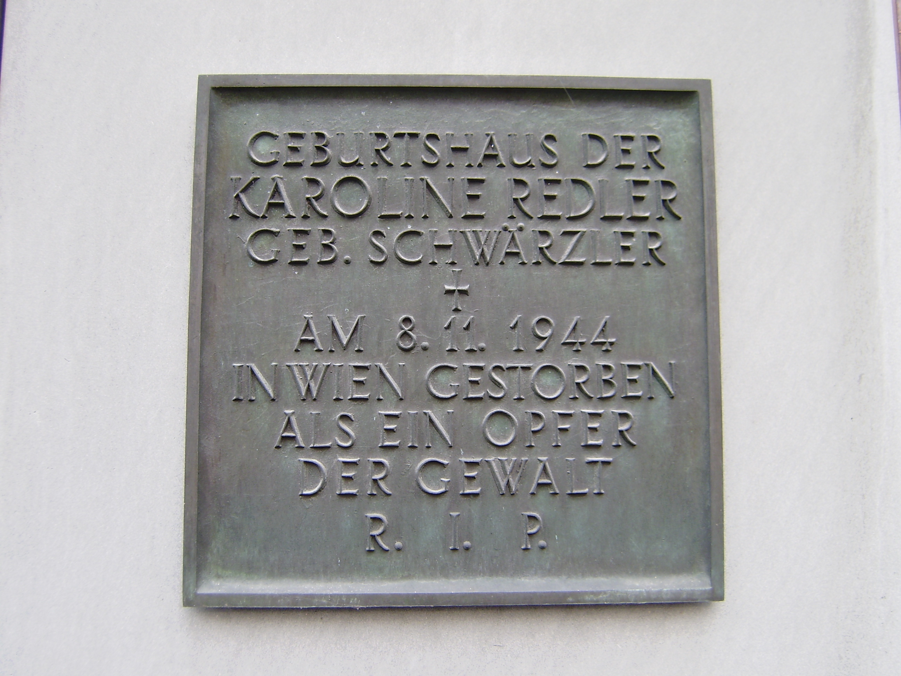 Die Erinnerungstafel an die von den Nationalsozialisten umgebrachte Karoline Redler (1883-1944) wurde in den 1960er Jahren von Karoline Redlers Neffen Paul Schwärzler an ihrem Geburtshaus (Pircher Haus; auch Schwärzler Haus) Rathausstr 2 in Bregenz (Vorarlberg) angebracht.